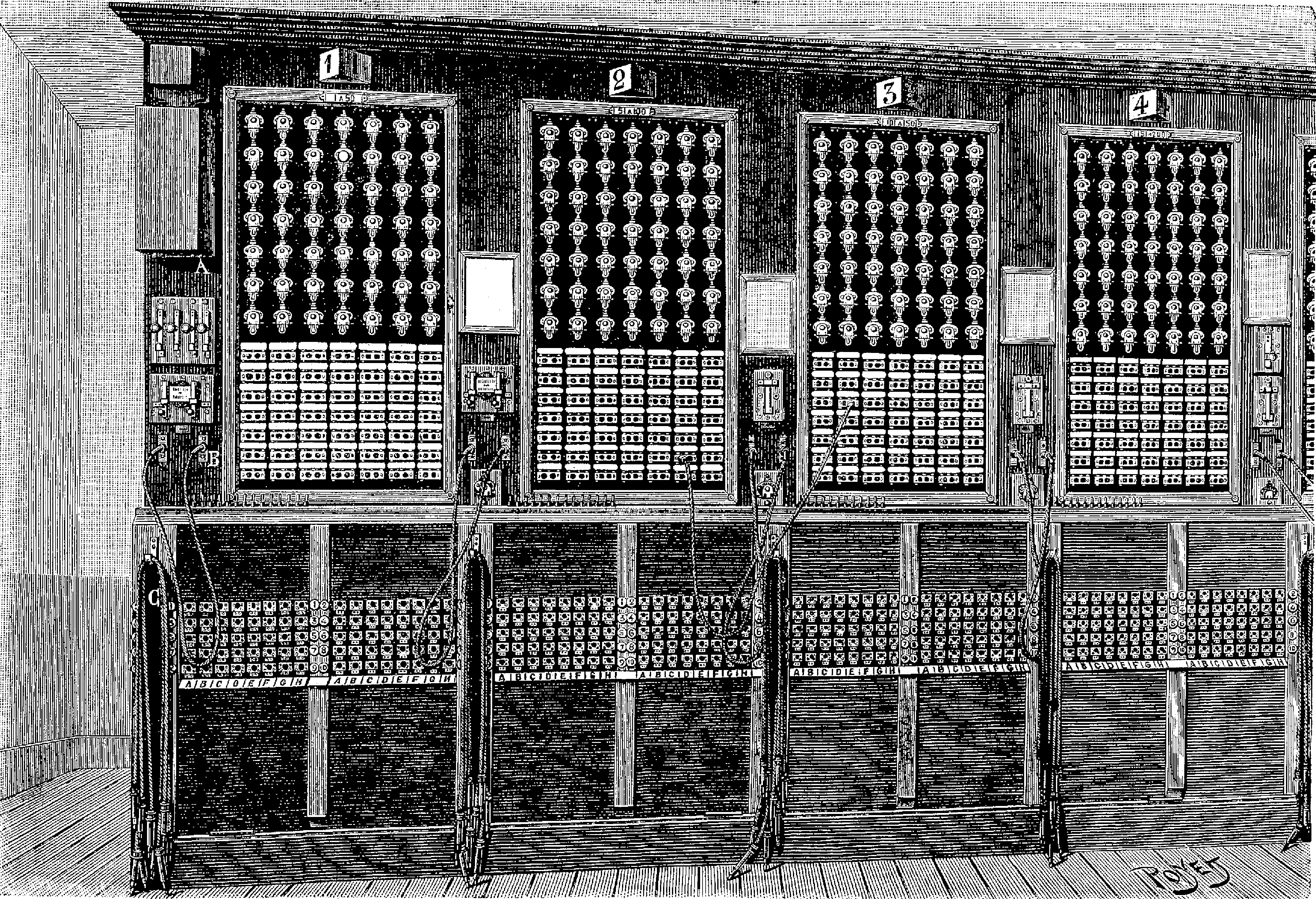 Le bureau central de la Société générale des téléphones à la Villette (Paris)